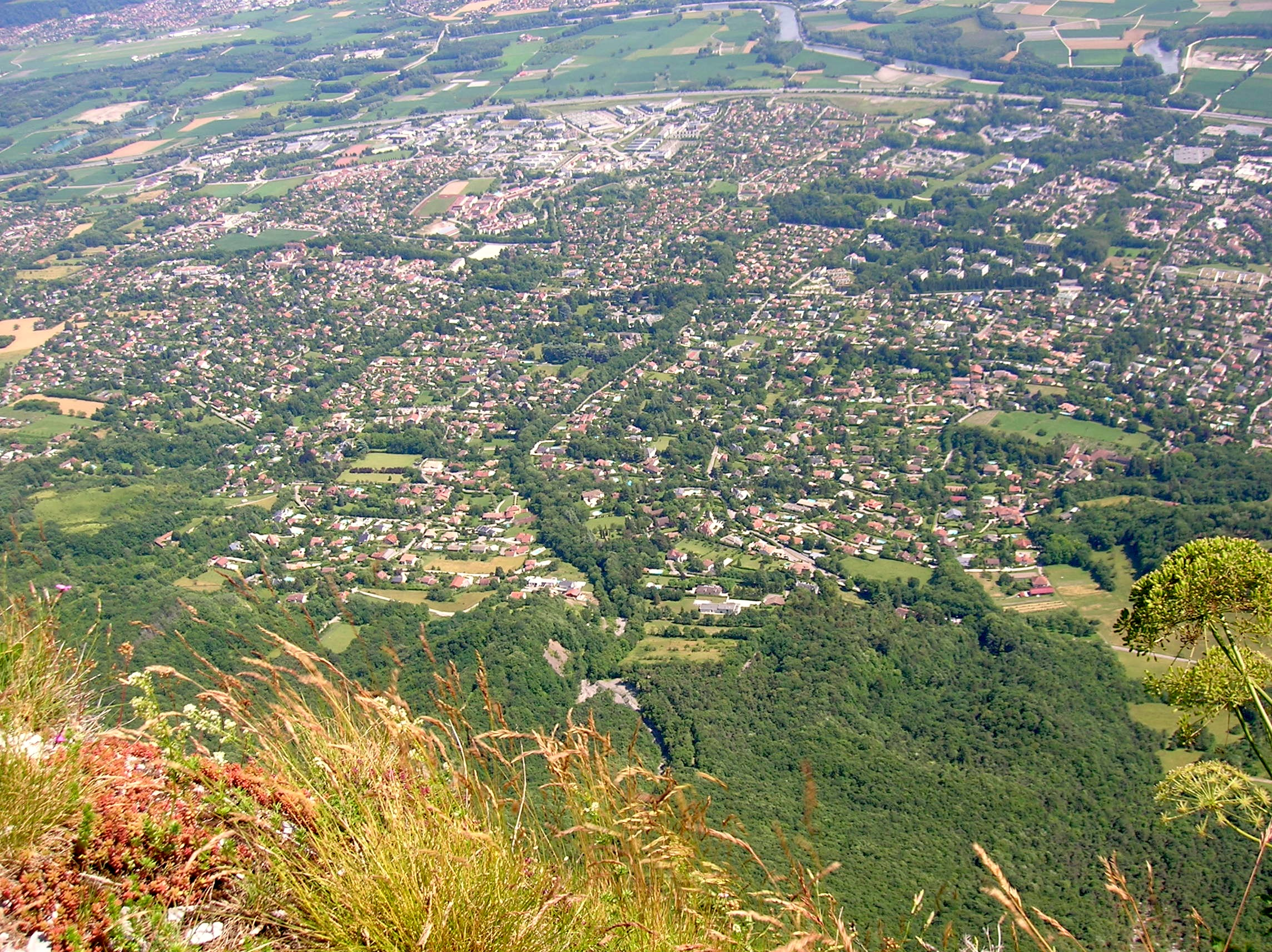 Vue générale de l'agglomeration grenoblois depuis le Fort St Eynard, Le Sappey-en-Chartreuse, Isère, France. Meylan, Biviers, Montbonnot-Saint-Martin, etc.